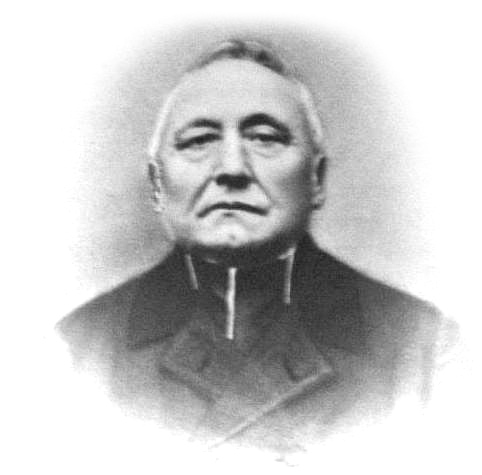 Photographie de Jean Baptiste Senderens, prêtre et chimiste (1854-1937)